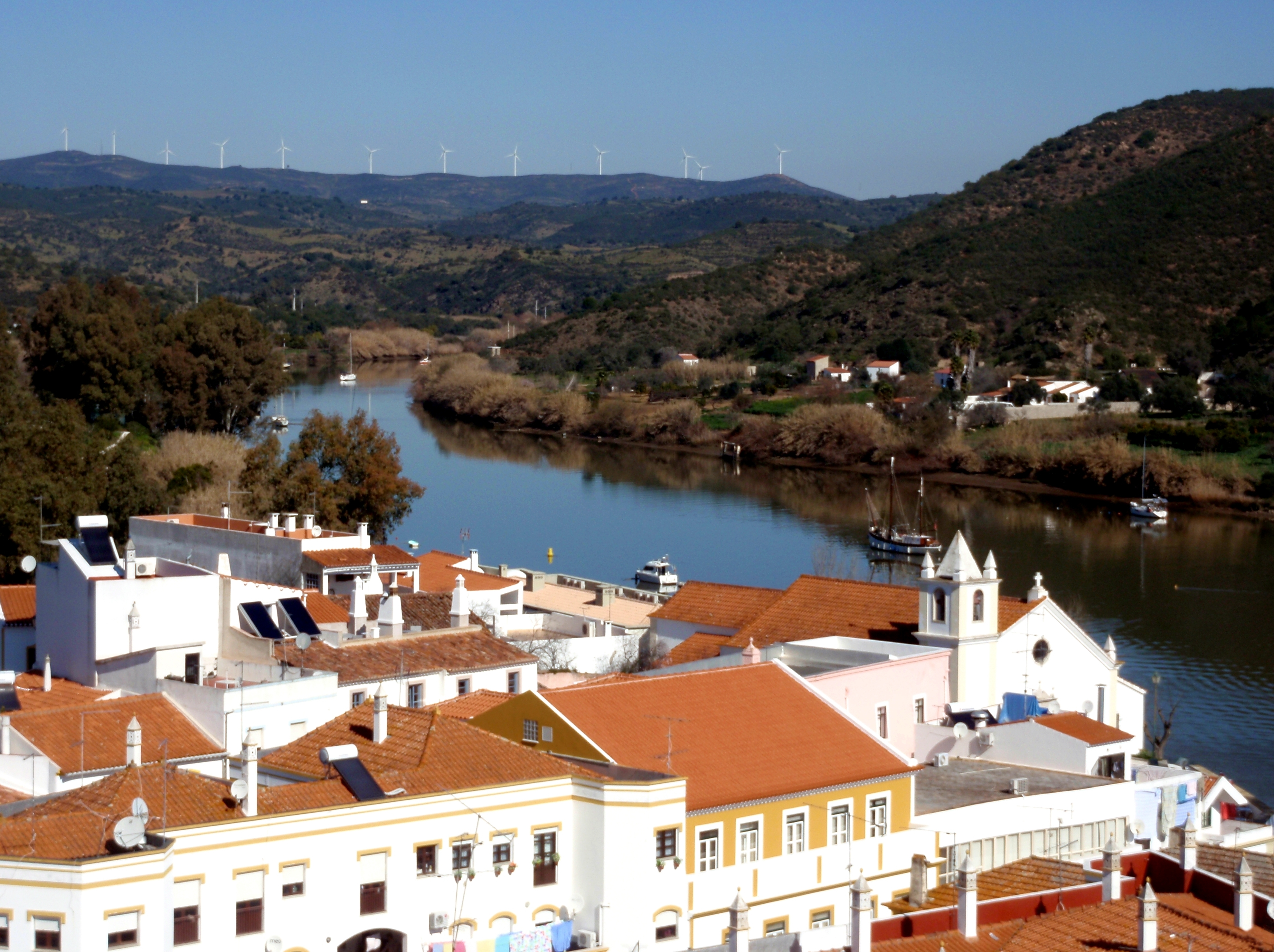 Alcoutim